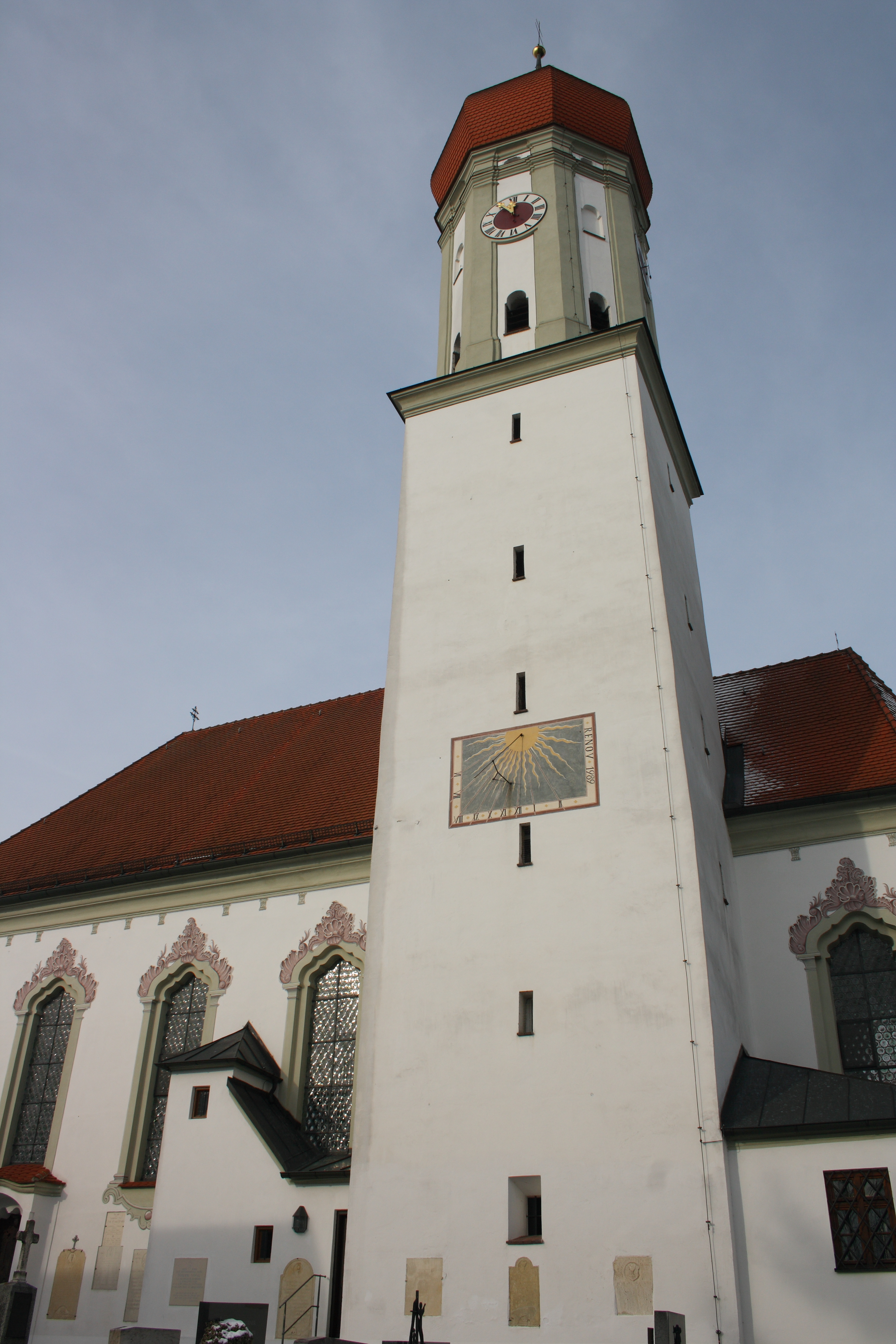 Katholische Pfarr- und Wallfahrtskirche Mariä Schmerzen in Waldkirch, einem Ortsteil von Winterbach (Schwaben) im Landkreis Günzburg (Bayern), 1745 von Joseph Dossenberger errichtet, Turm mit Sonnenuhr